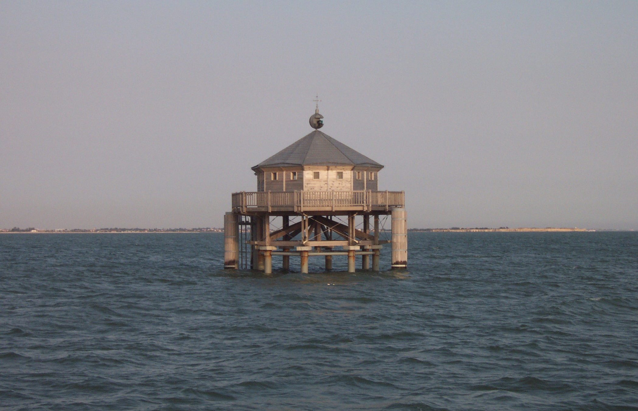 Description = Phare du bout du monde à La Rochelle Source = Photo taken by Remi Jouan Date = Juin 2001 Author =Remi Jouan